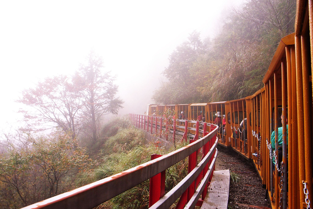 Taiping Mountain Bong Bong Train 太平山蹦蹦車